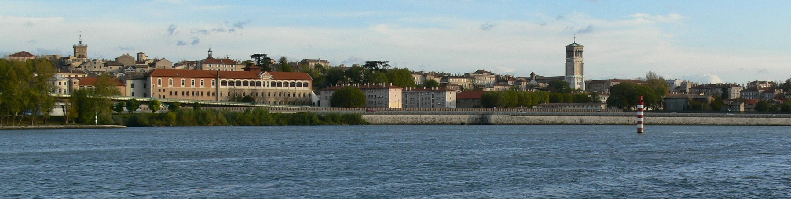 Panorama de Valence (Drôme) vue depuis la rive droite du Rhône. Photo prise le 5 novembre 2005 par Jacques Forêt (Secquajectrof)